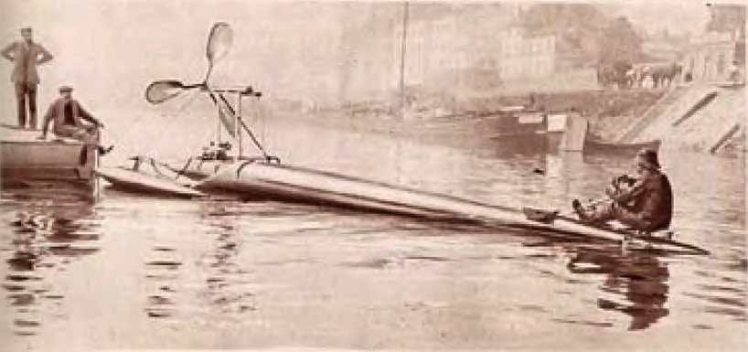 Photographie de l'hydroplane de Santos-Dumont, posé sur la Seine, en septembre 1907